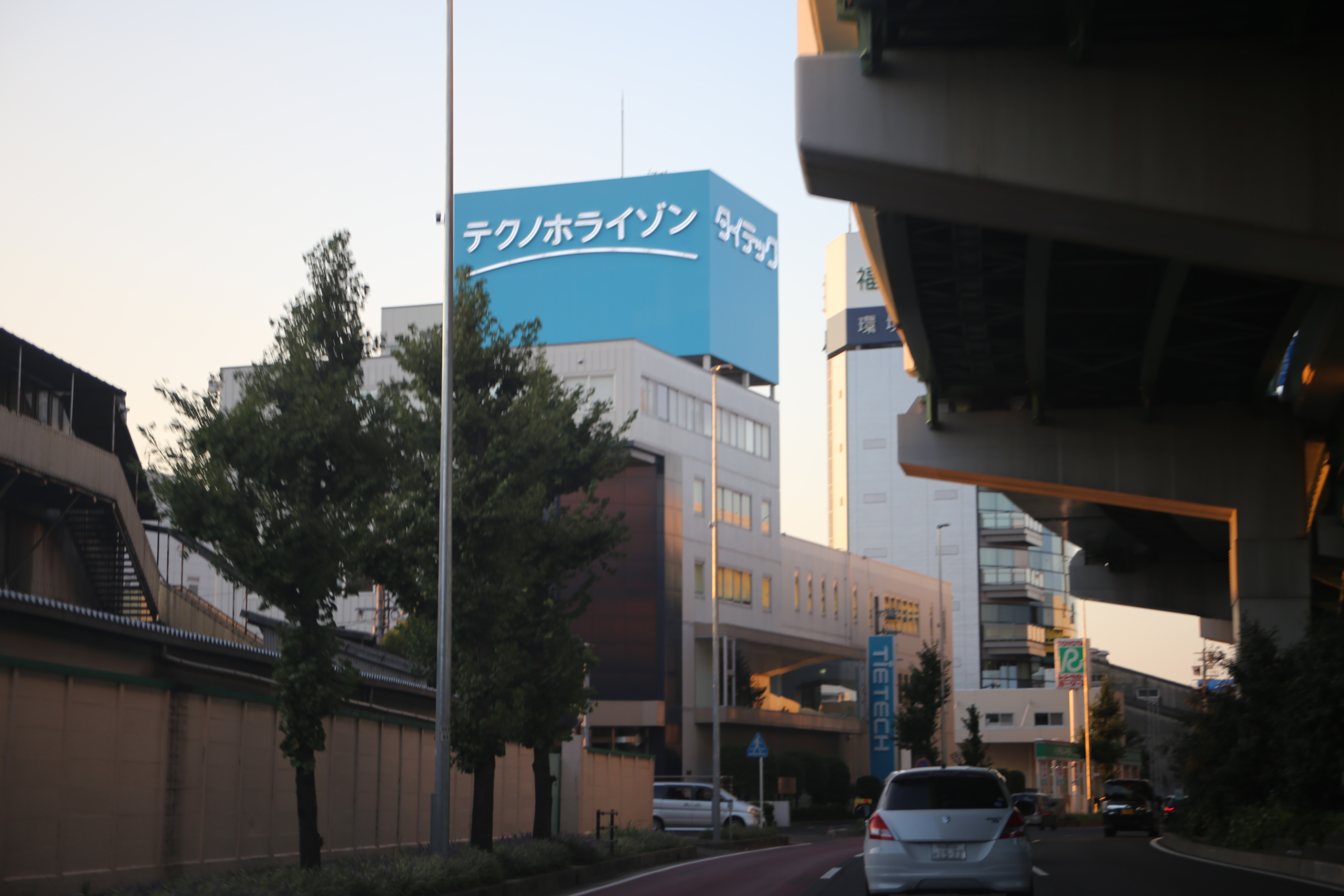 名古屋市南区千竈通のテクノホライゾンホールディング・タイテック本社を東側公道南側より撮影。ただし、ナンバープレートにつき画像処理済。